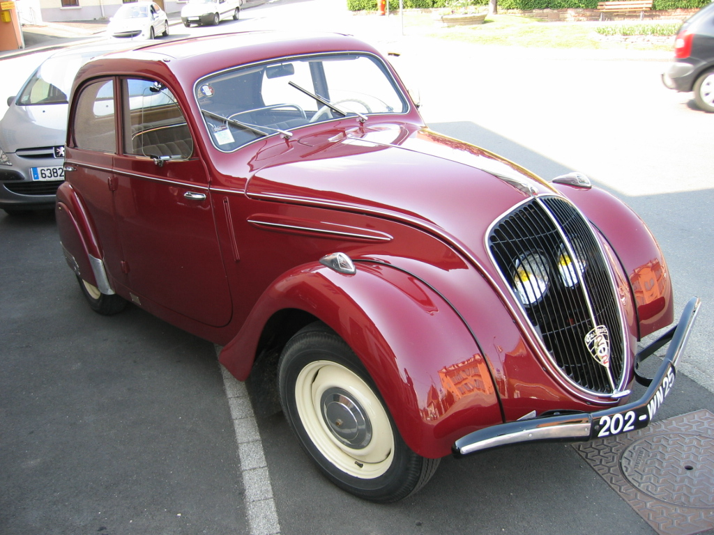 Peugeot 202 de monsieur Beucler Bernard - 25420 Bart - Franche Comté